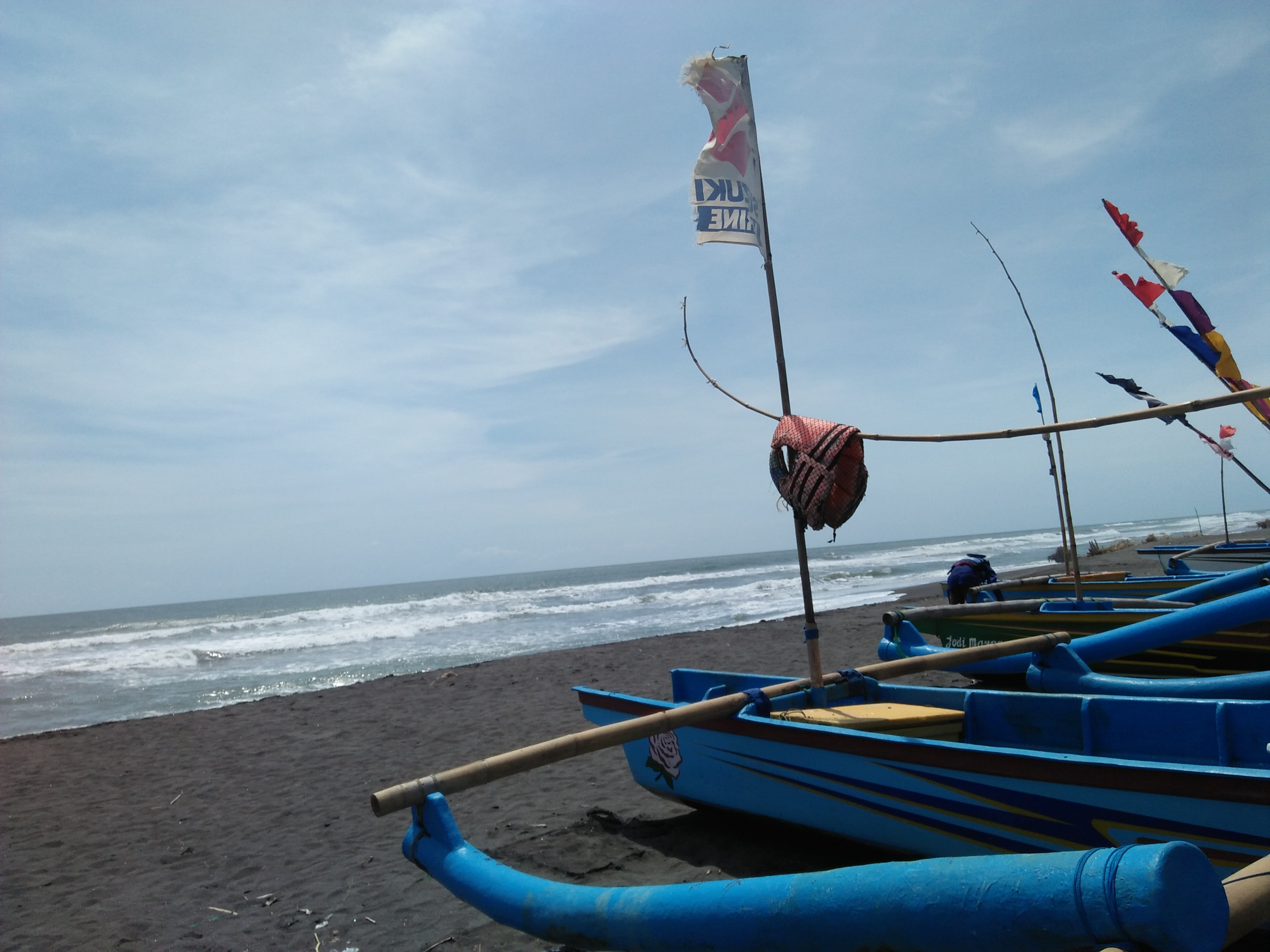 Jawa: Gambar iku yaiku swasana ing Laut Depok Yogyakarta. swasana awan ing laut Depok kang endah. Laut kang endah isa gawe seneng ati